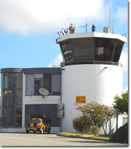 Torre de Controle Tires